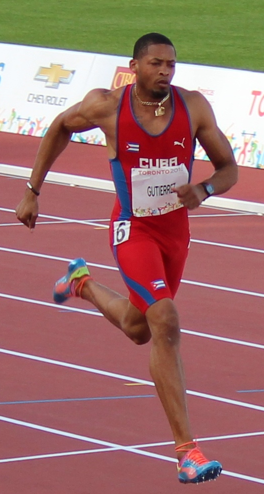 100m T13 men 2015 Parapan American Games